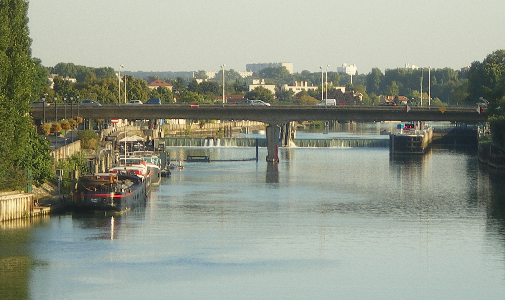 Le pont de Créteil. A l'arrière plan, le barrage